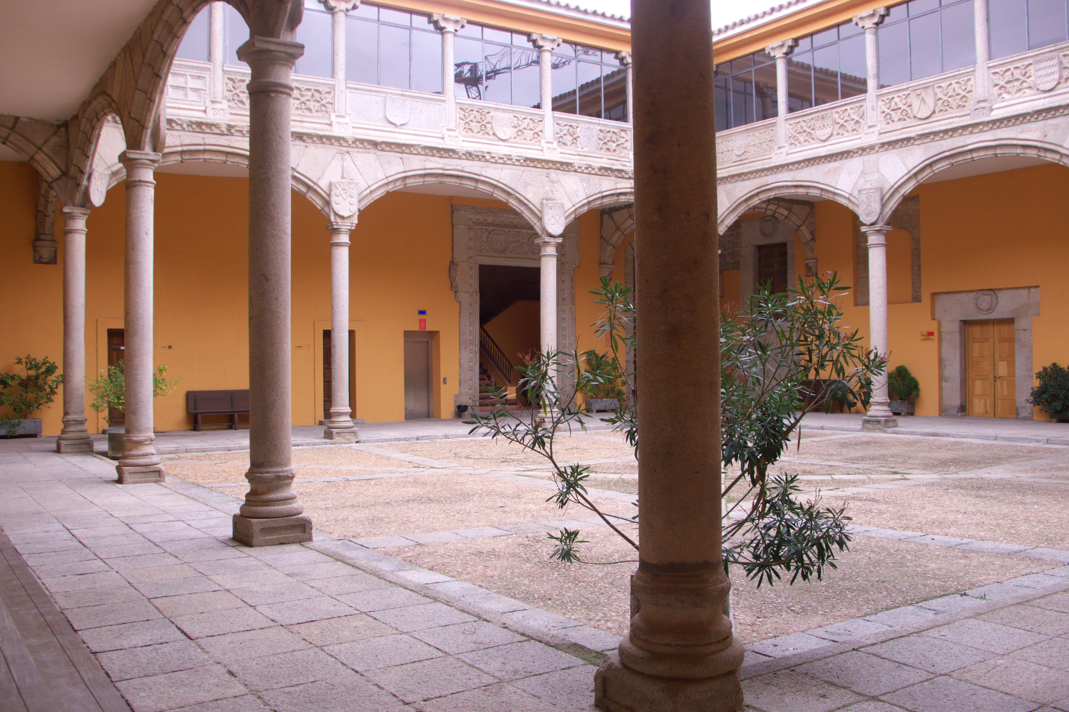 Mariscal de Castilla. Cabeza de la familia Bracamonte. En este patio, vemos los escudos de los principales caballeros de Ávila, los Valderrábanos, los Guzmanes, los Dávila, los Bracamontes, los Velascos, los Águila.